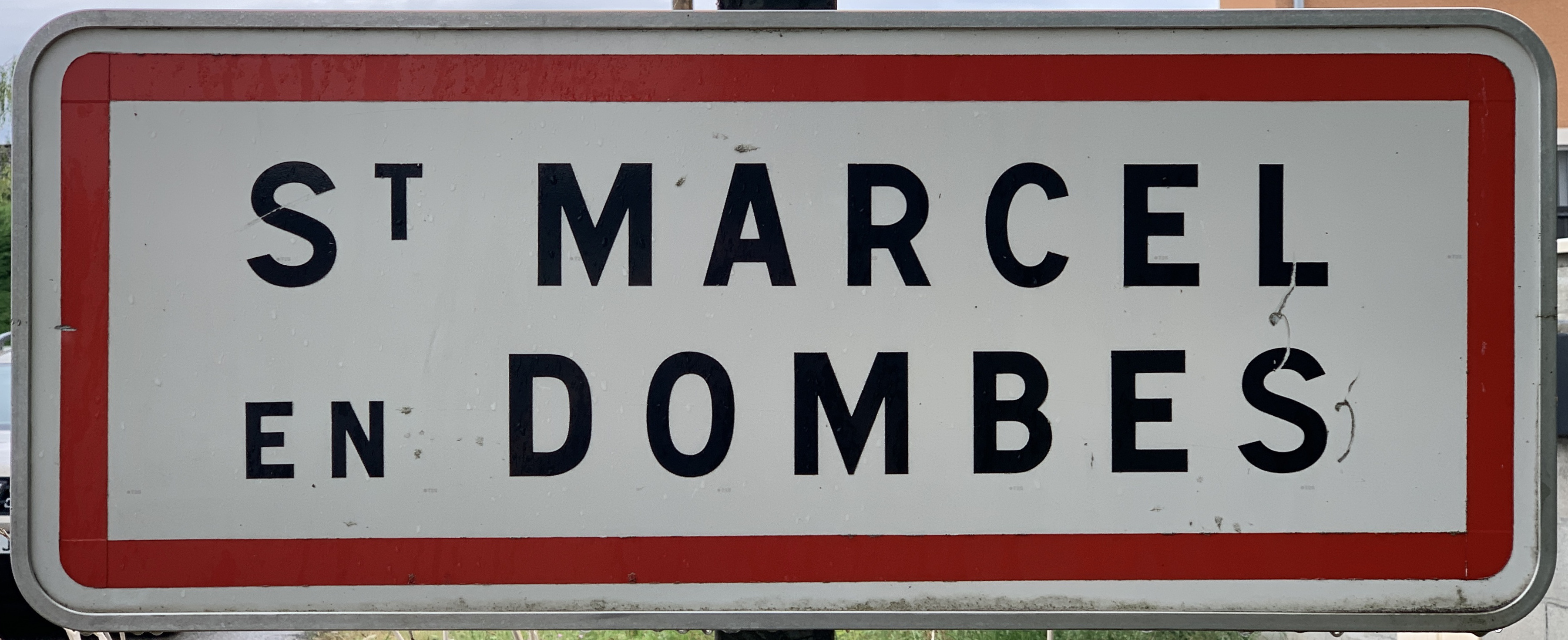 Panneau d'entrée dans Saint-Marcel-en-Dombes.